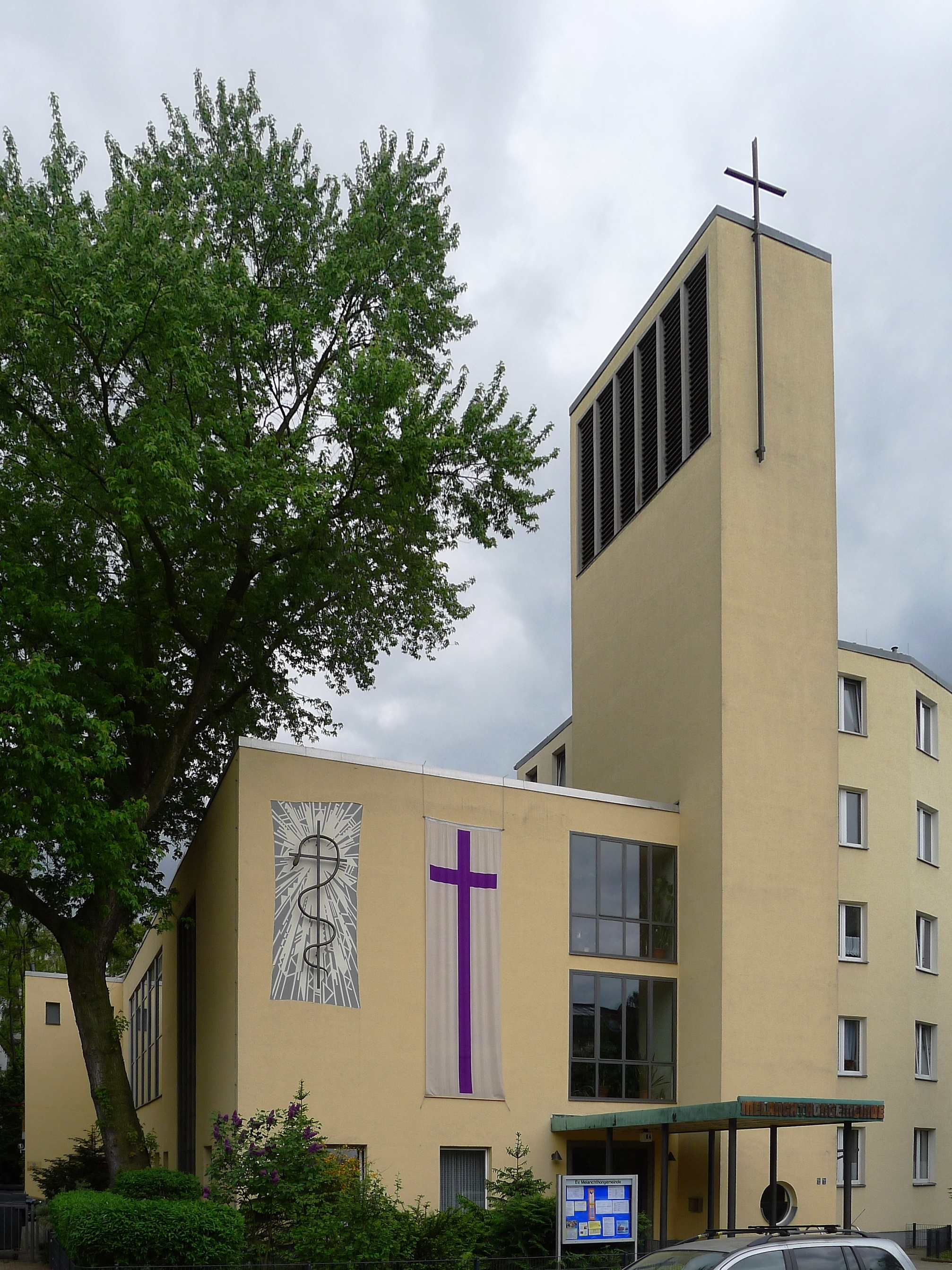 Blick auf Turm und Eingang zur Kirche